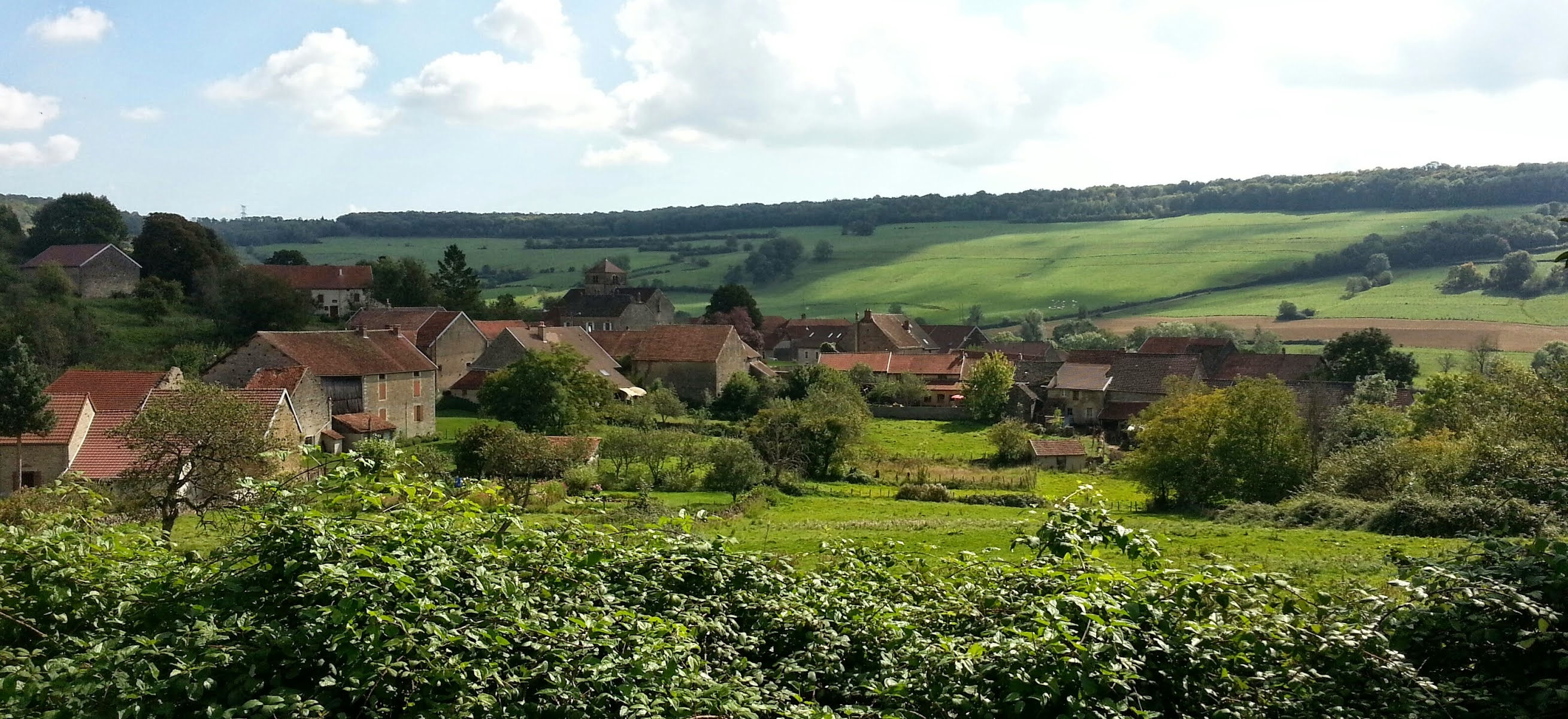 Un village de fond de vallée en Bourgogne: Echannay